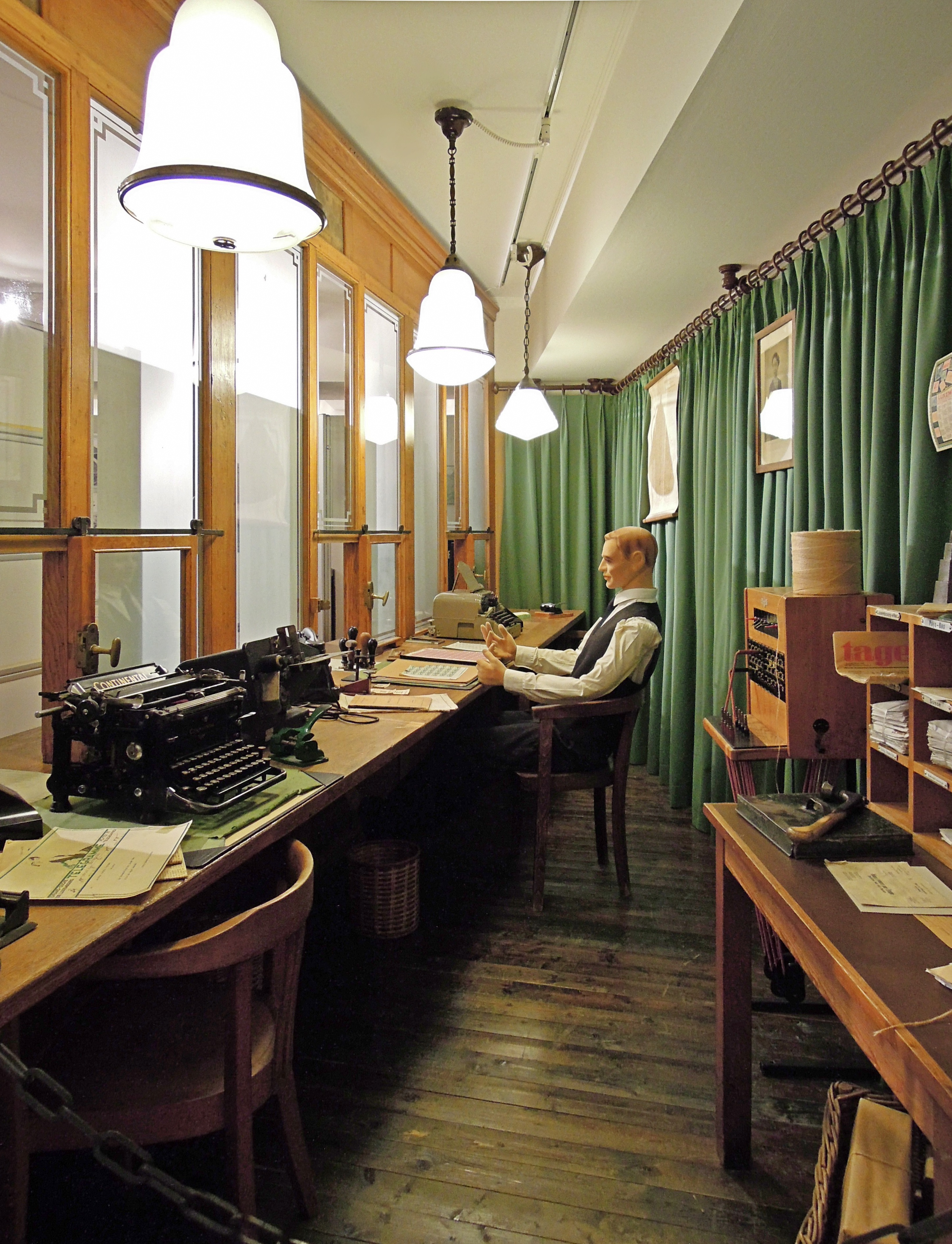 Postschalter